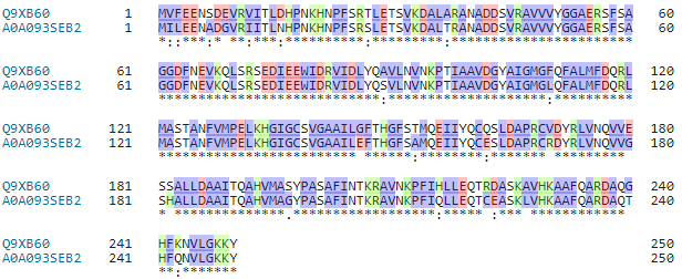 Alineament de la CarB i la proteïna CotG de la coberta de les espores bactrianes del Pectobacterium polaris, les quals tenen un 90,8% d'identiat. La imatge està generada amb UniProt.